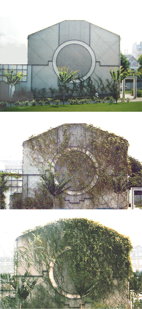 "Horloge végétale" œuvre en treillage métallique et plantes grimpantes, square Héloise et Abédiard Paris XIII